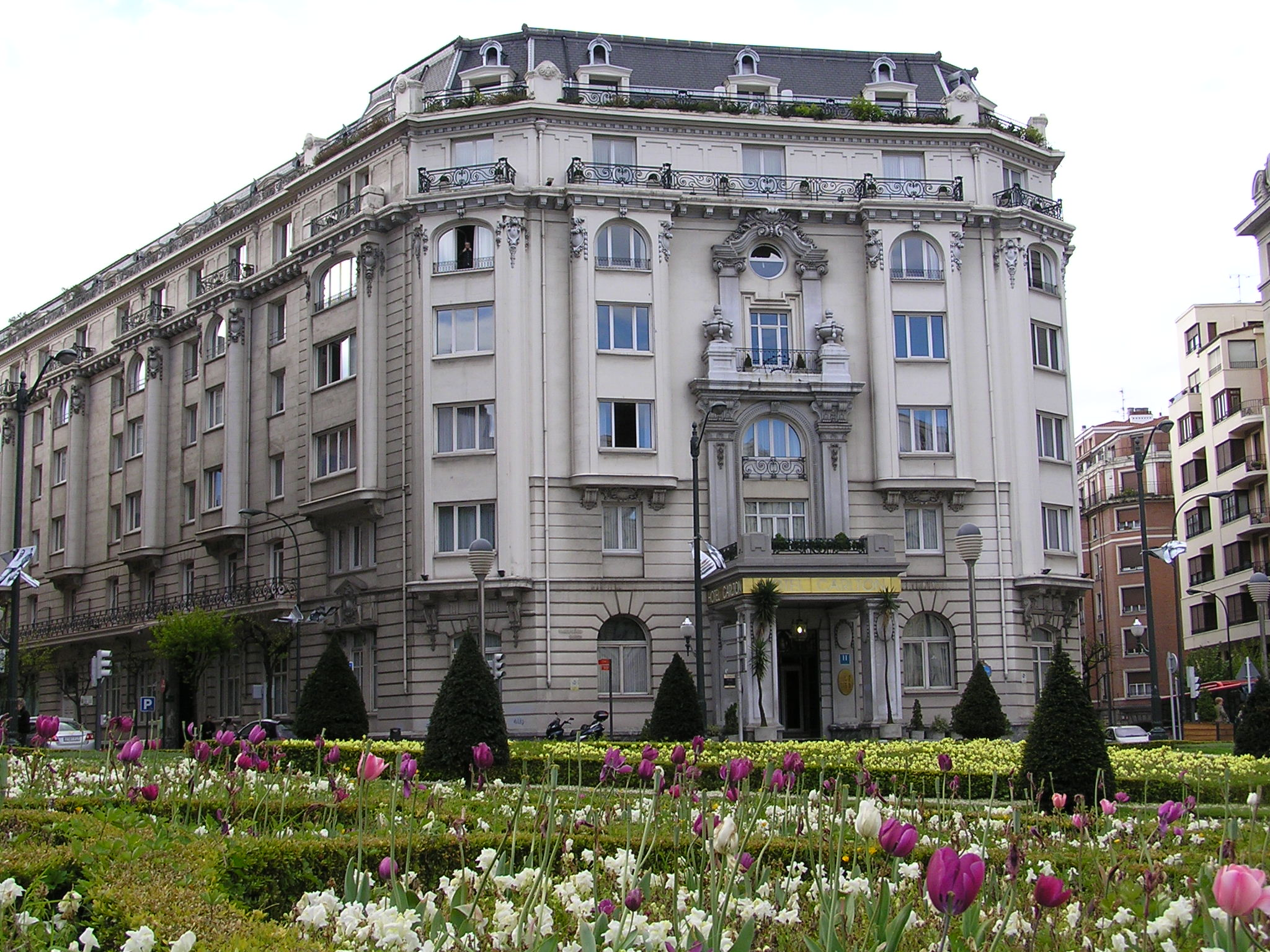 Carlton hotela. Bilbo. Bizkaia, Euskal Herria. Carlton Hotel, Bilbao. Bizkaia, Basque Country.